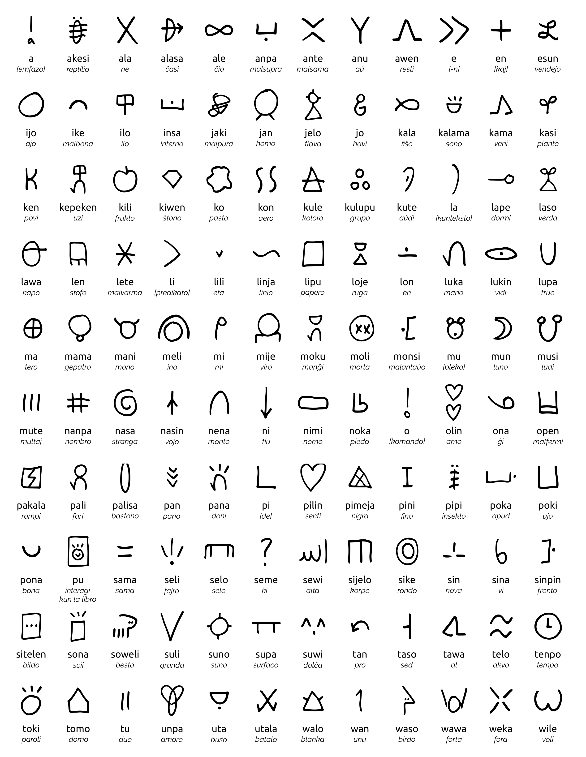 skriosistemo por la Tokipono farita de Sonja Lang kun difinoj en Esperanto